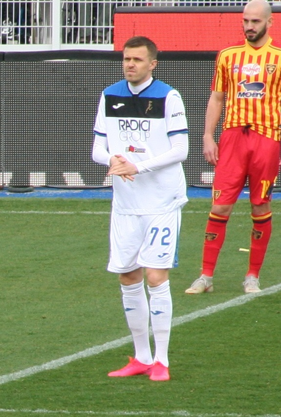 Calcio di inizio della partita Lecce-Atalanta, disputata a Lecce il 1° marzo 2020